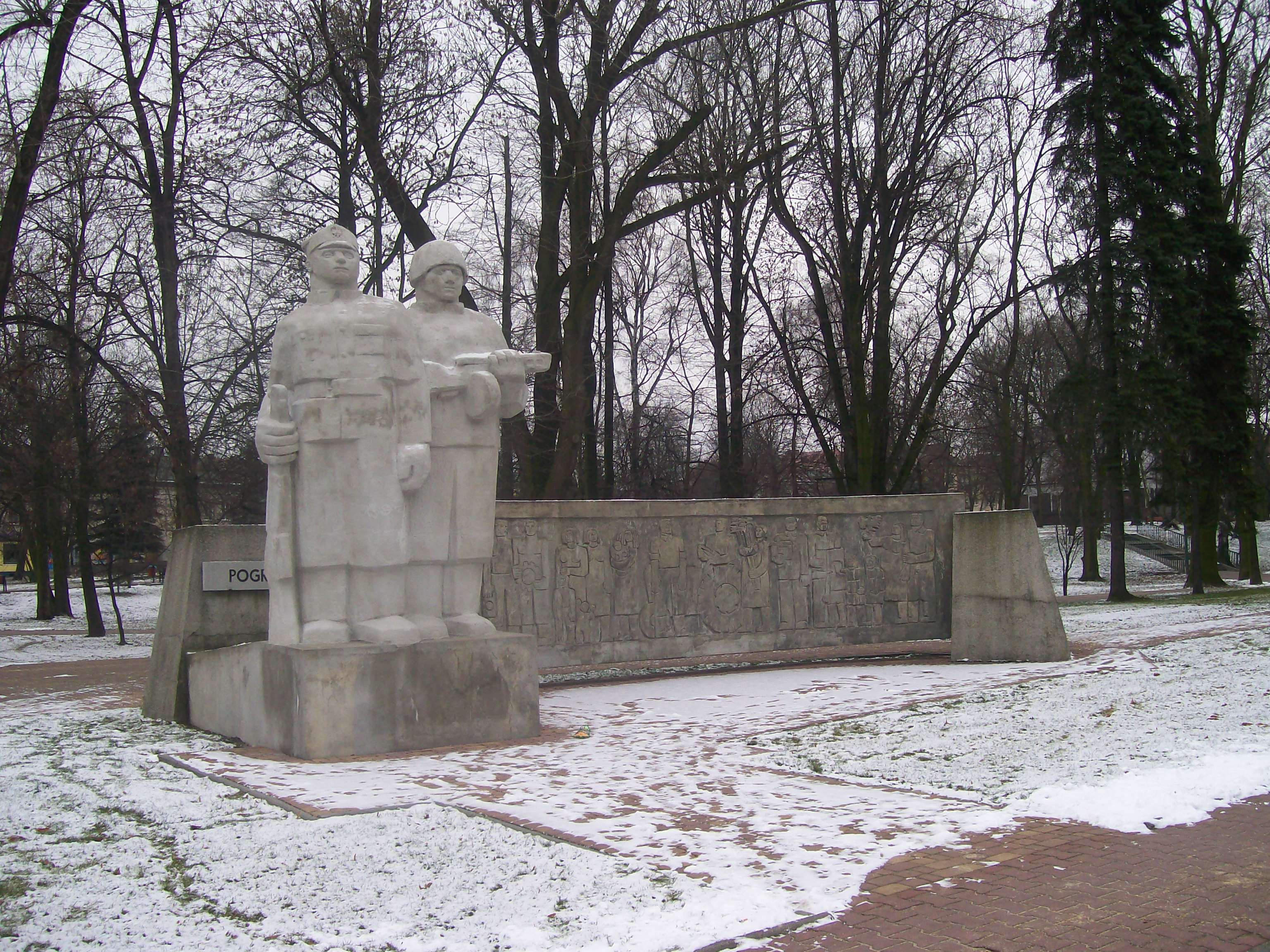 socrealistyczny pomnik "Pogromcom hitleryzmu"